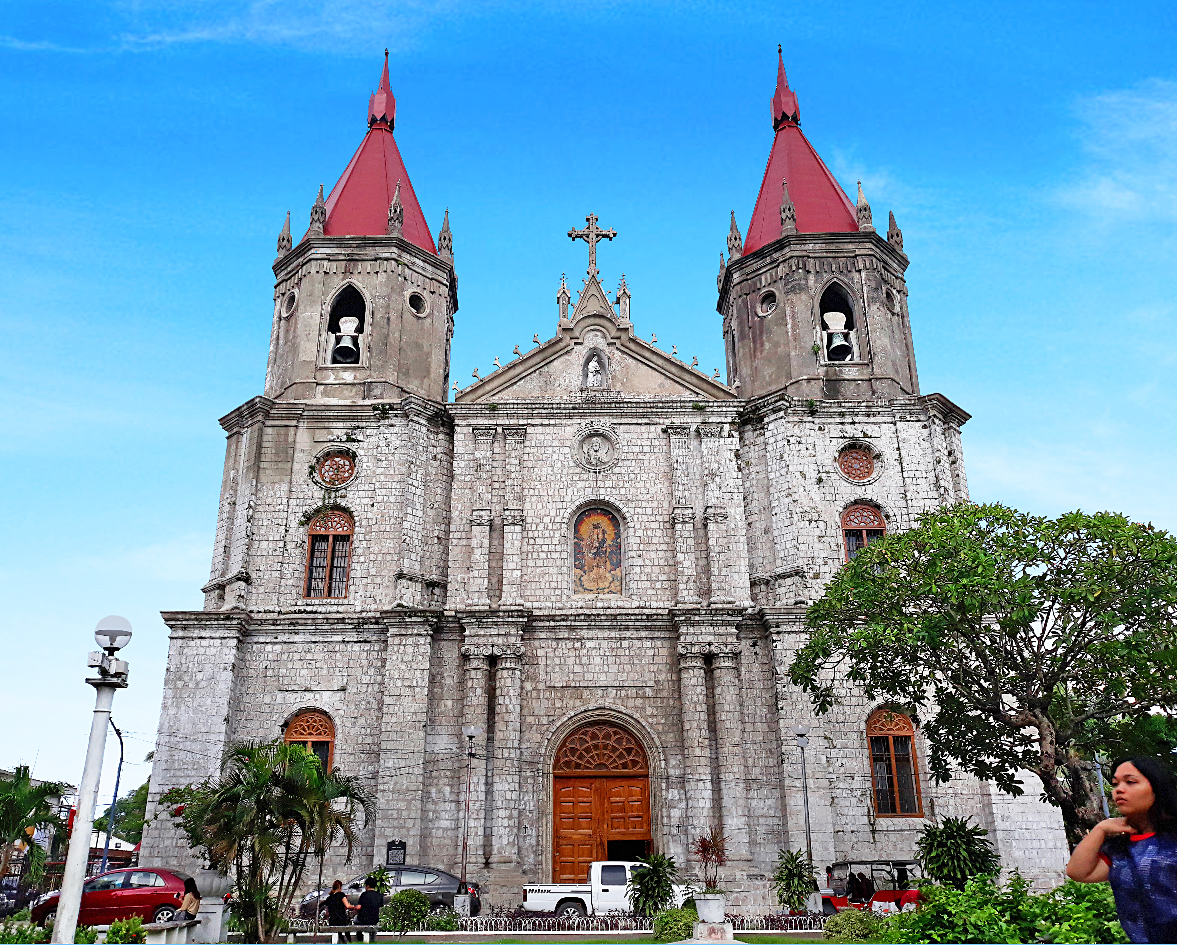 Parroquia de Sta. Ana